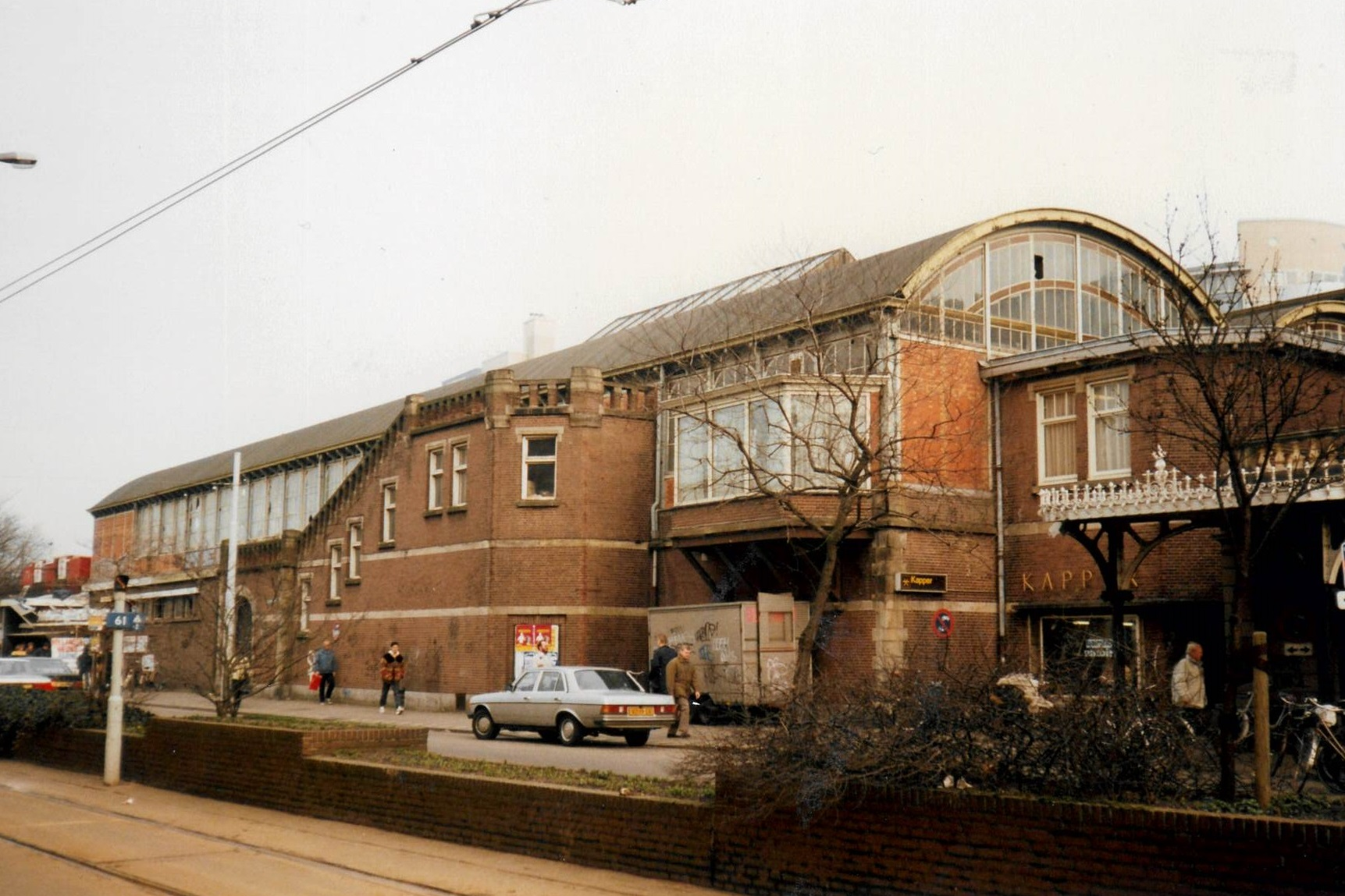 Station Den Haag HS, de in de jaren '90 gesloopte ZHESM aanbouw aan noordwestzijde (foto: Daniel van der Ree, 4 maart 1991)